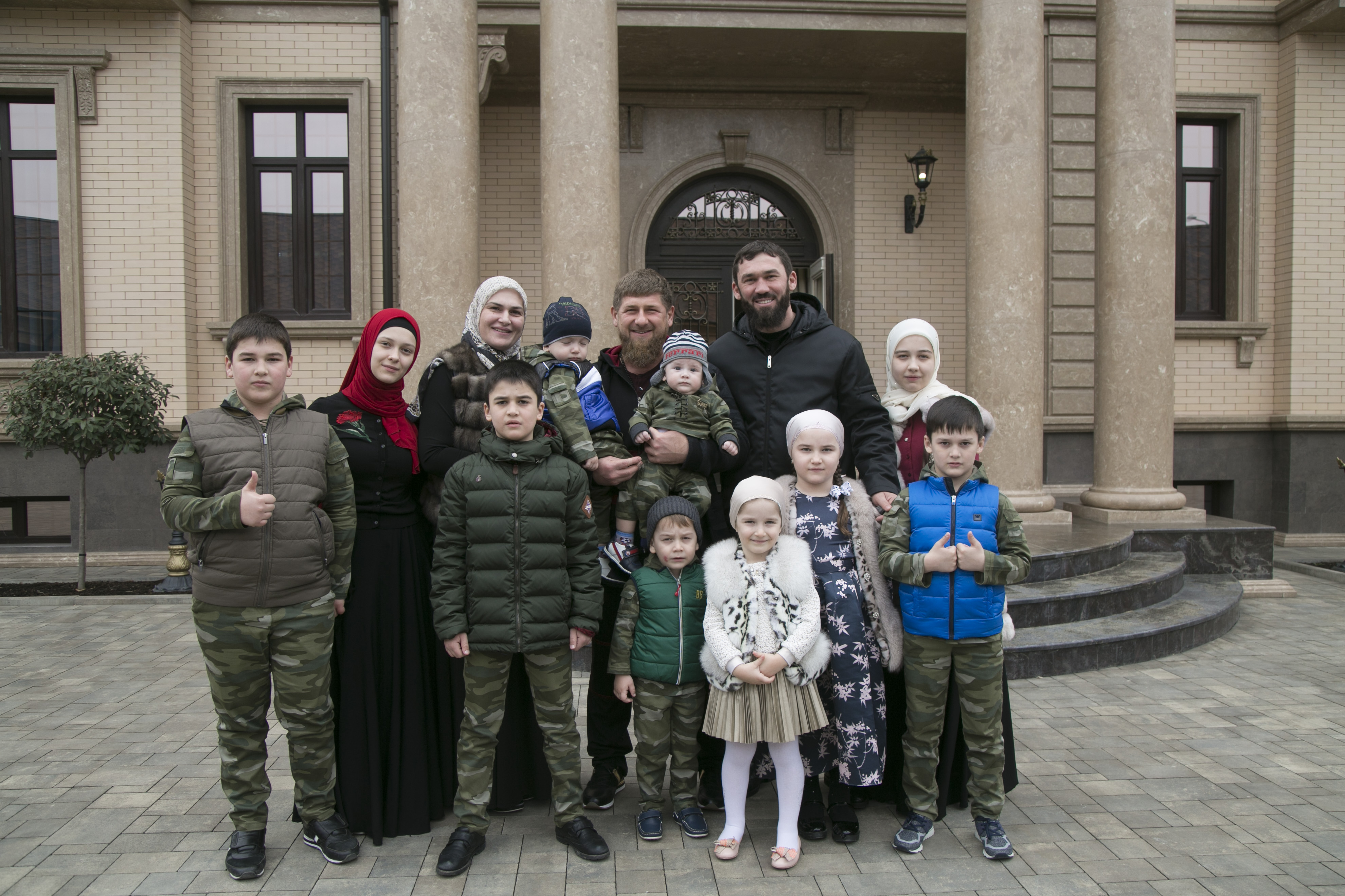 Глава Чеченской Республики, Герой России Рамзан Ахматович Кадыров в гостях у Председателя Парламента Чеченской Республики - Магомеда Хожахмедовича Даудова. Памятное фото с семьей М. Даудова.